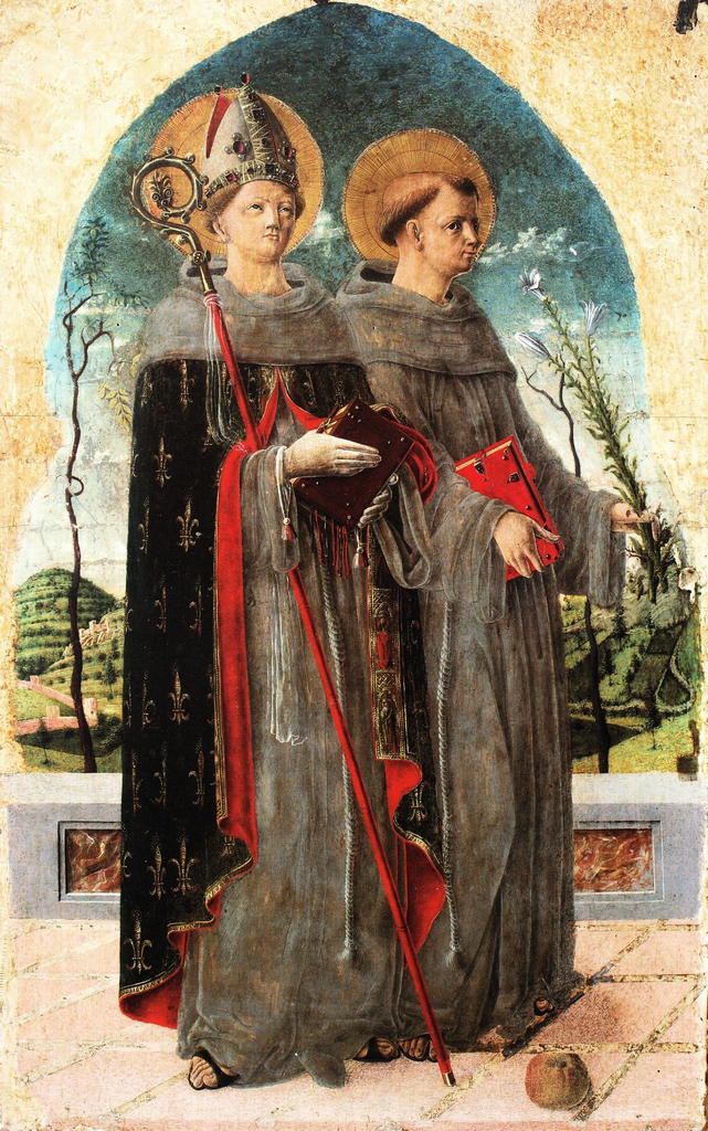 San Ludovico di Tolosa e Sant'Antonio